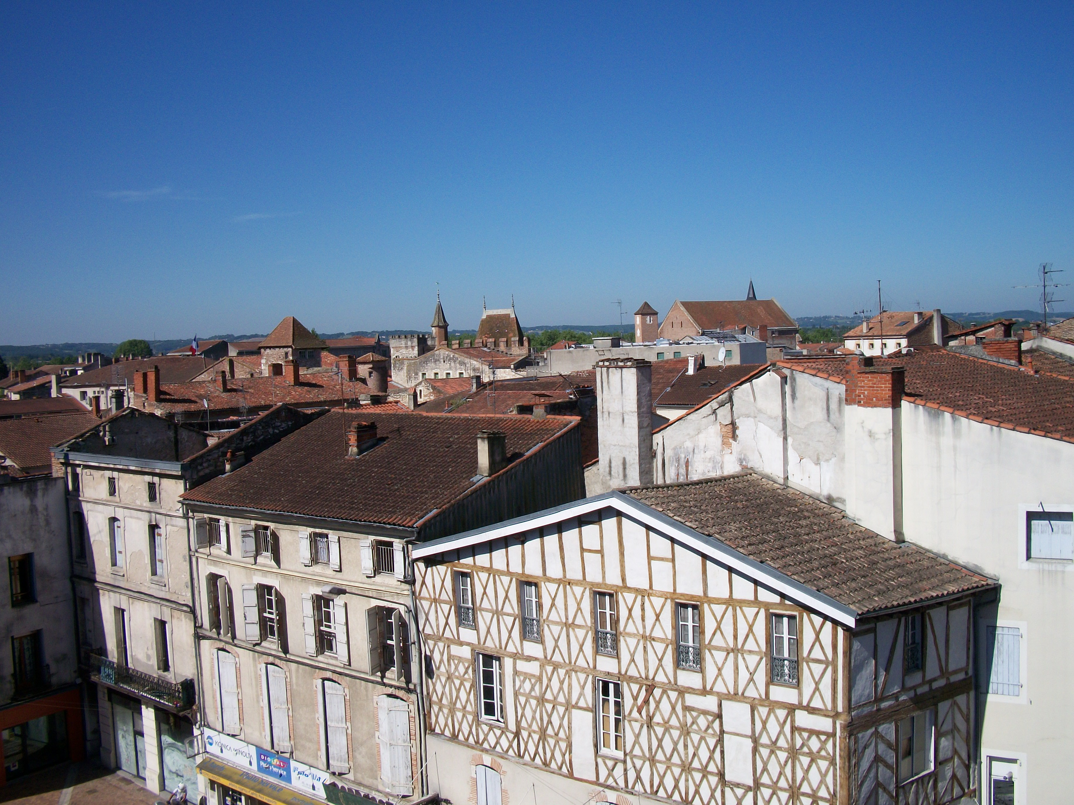 Agen, Lot-et-Garonne, France